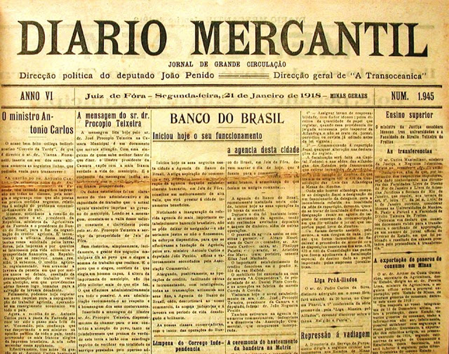 Parte da primeira página da edição 1 945, ano VI, do Diário Mercantil, com a notícia da inauguração da agência do Banco do Brasil na cidade de Juiz de Fora, Minas Gerais, Brasil.